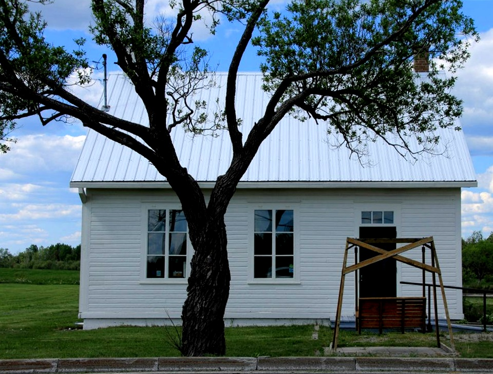 École du Rang-II-d'Authier, Chemin du 2e-Rang, Authier (Canada). (Protection IP classé. Voir la liste des lieux patrimoniaux de l'Abitibi-Témiscamingue pour plus de détails).